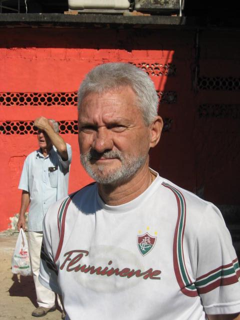 Berico, o presidente do Fazenda Futebol Clube, de São João de Meriti.